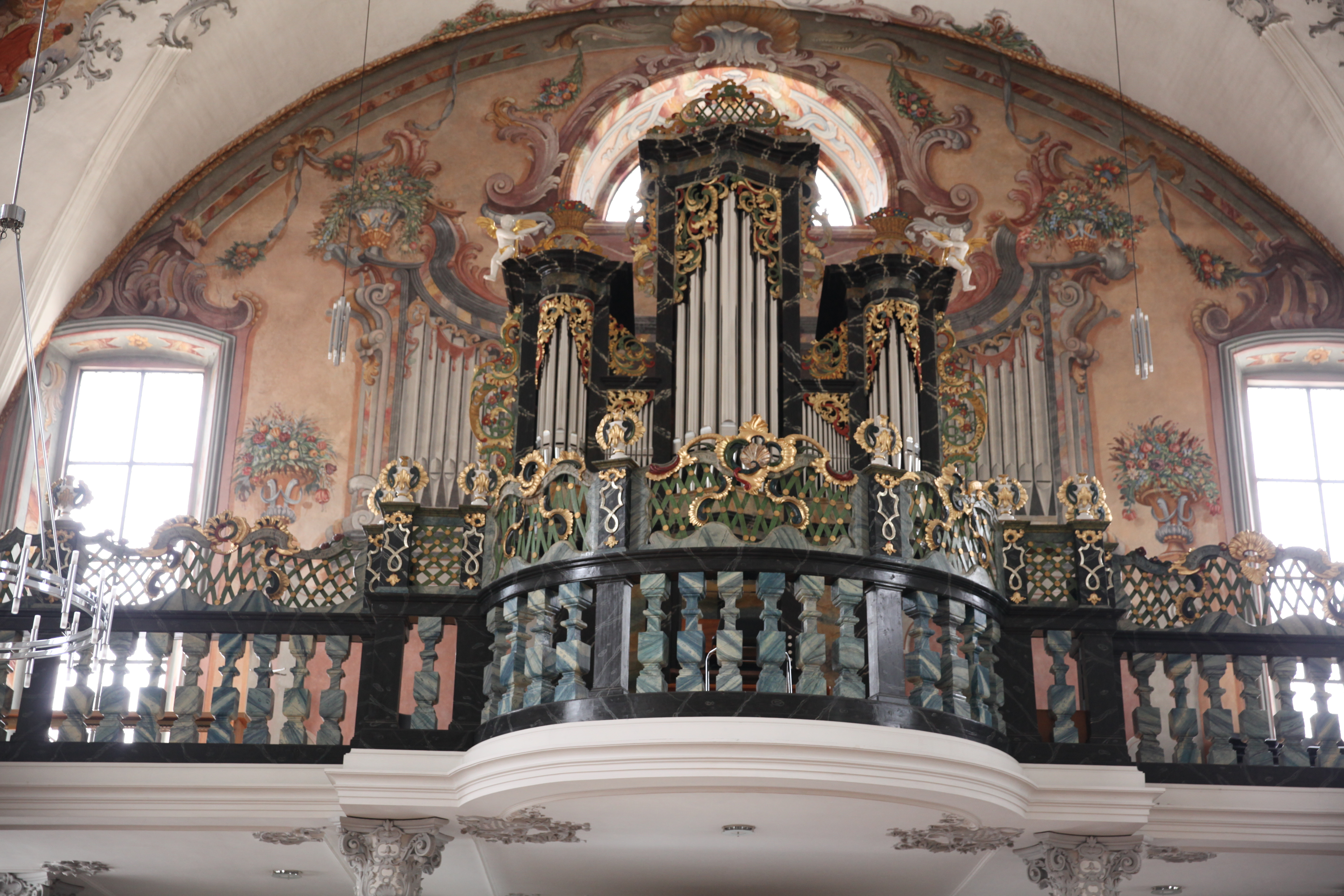 Andermatt, Katholische Pfarrkirche St. Peter und Paul, Orgel